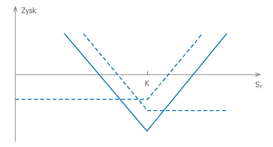 Strategia opcyjna straddle